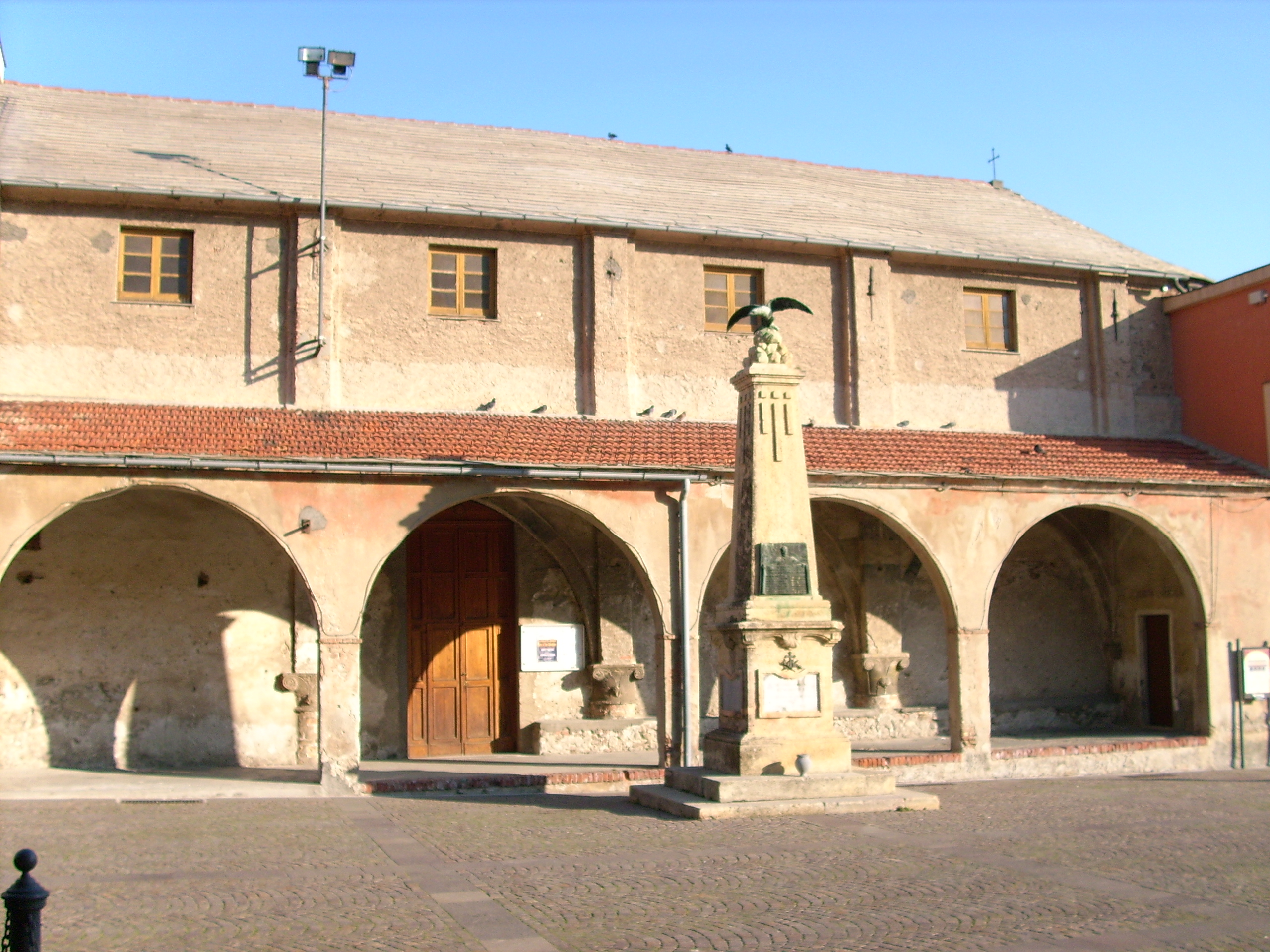 Oratorio di San Sebastiano presso la frazione di Valleggia (Quiliano), Liguria, Italy